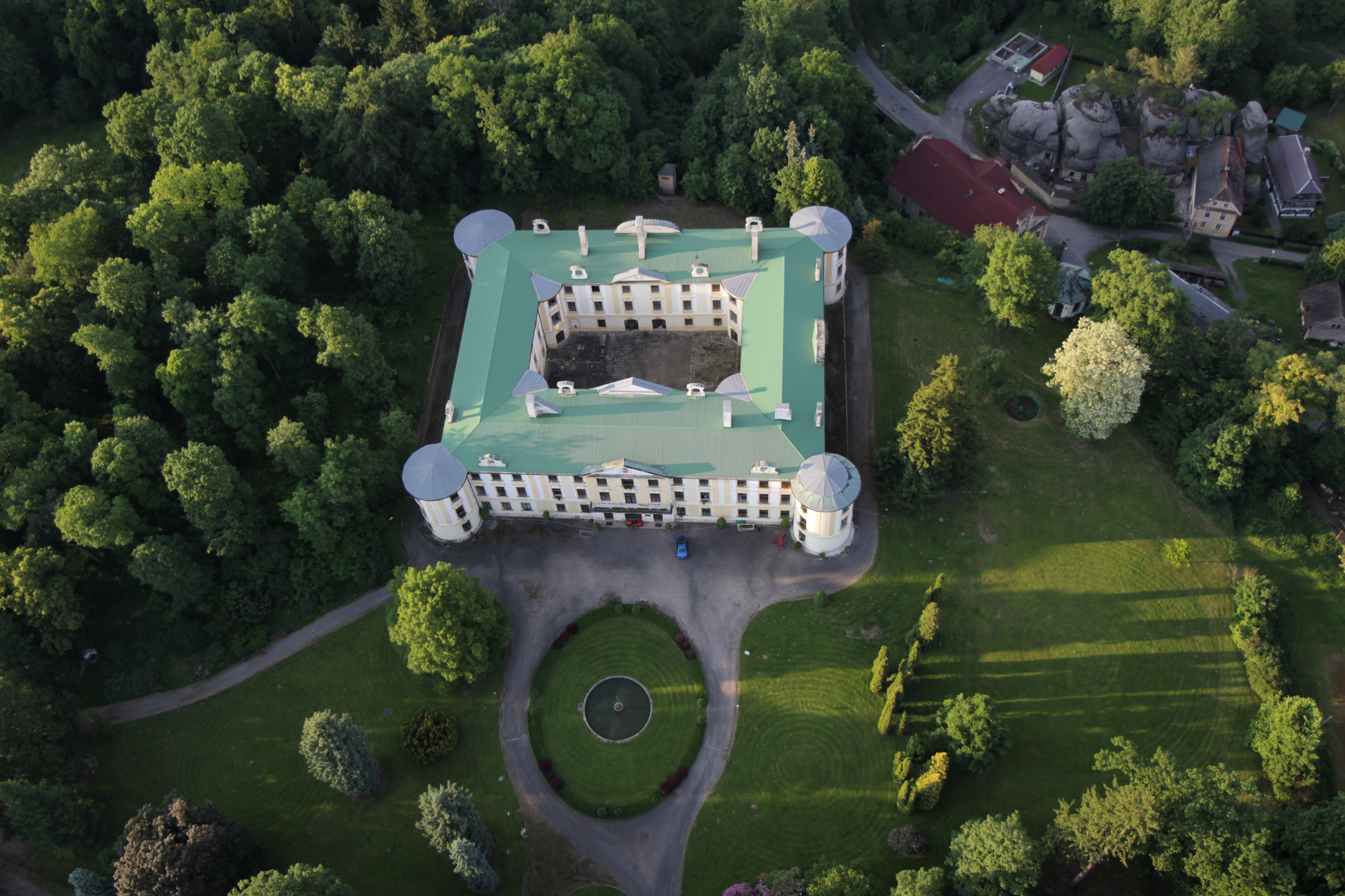 Zámek Zahrádky, Zahrádky 1